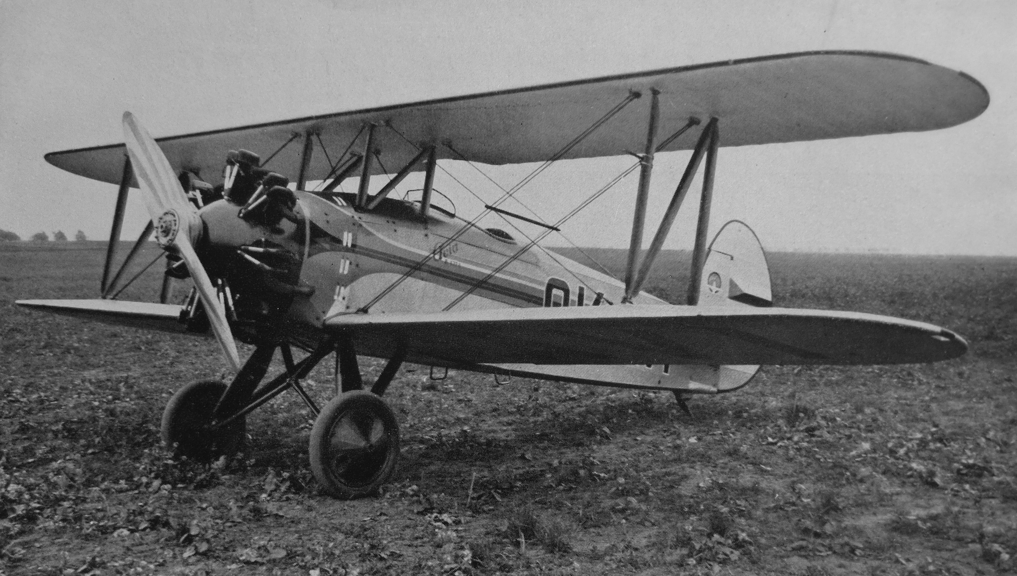 letecký motor Walter Castor II a akrobatický letoun Avia B-122 (1934)